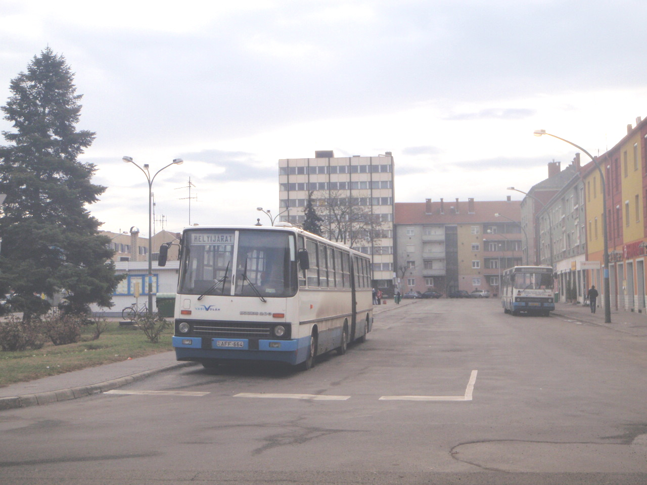 Steinamanger, Ehen Gyula Platz